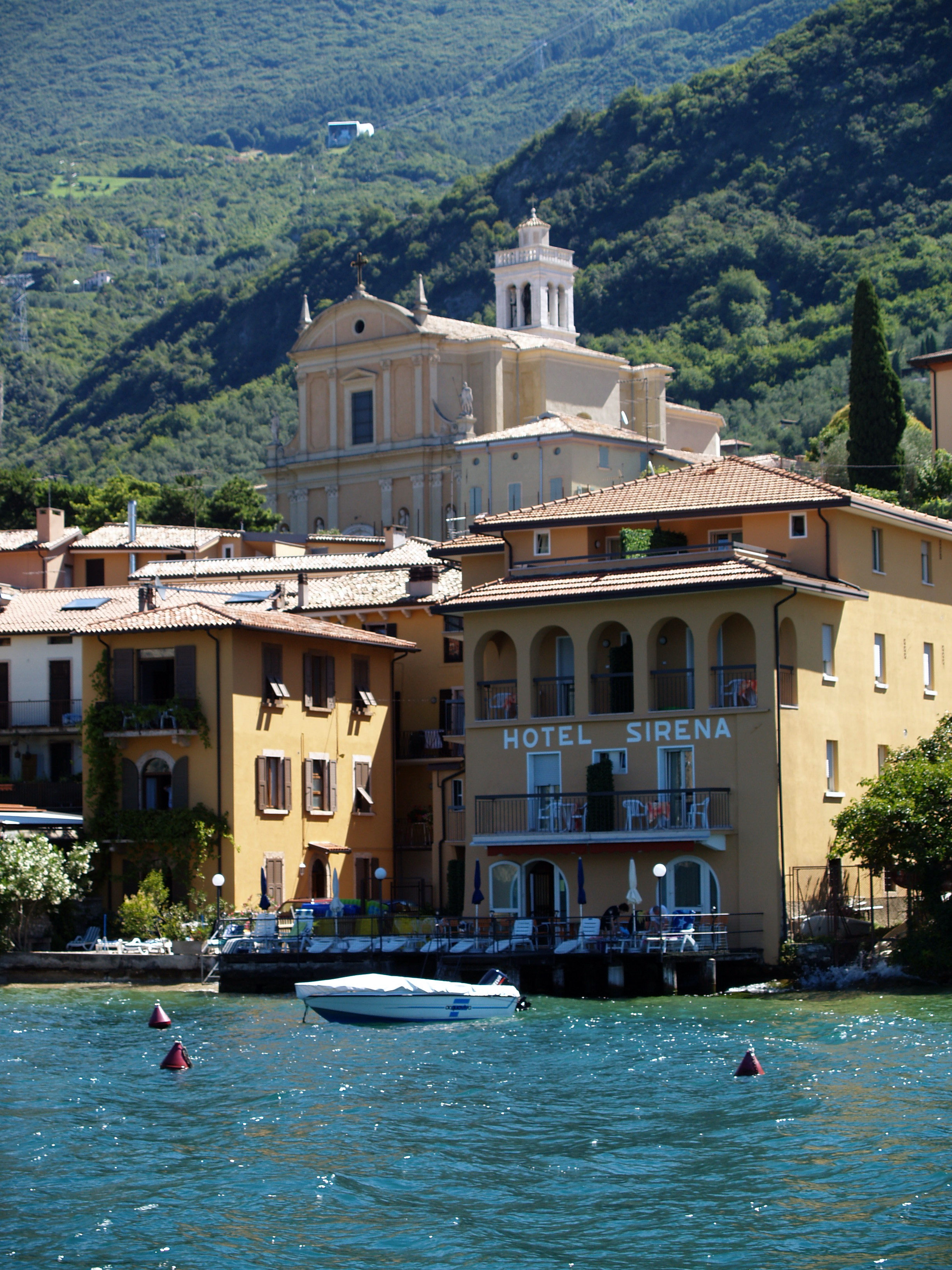 Malcesine